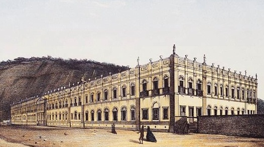 Foto do Hospício D Pedro II.